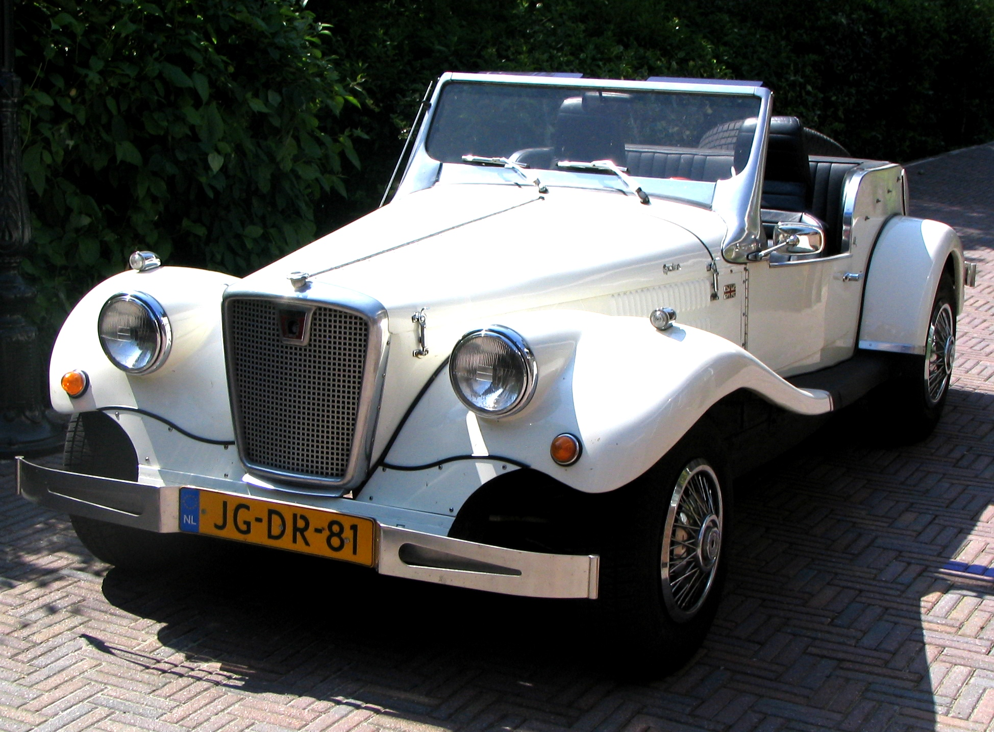 Spartan MK II